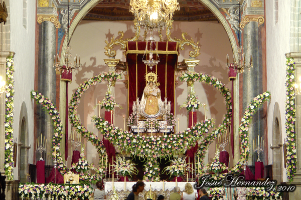 Vista del Altar Mayor de la Parroquia de San Juan Bautista, en el día de la festividad de Nuestra Señora del Carmen. Julio 2010